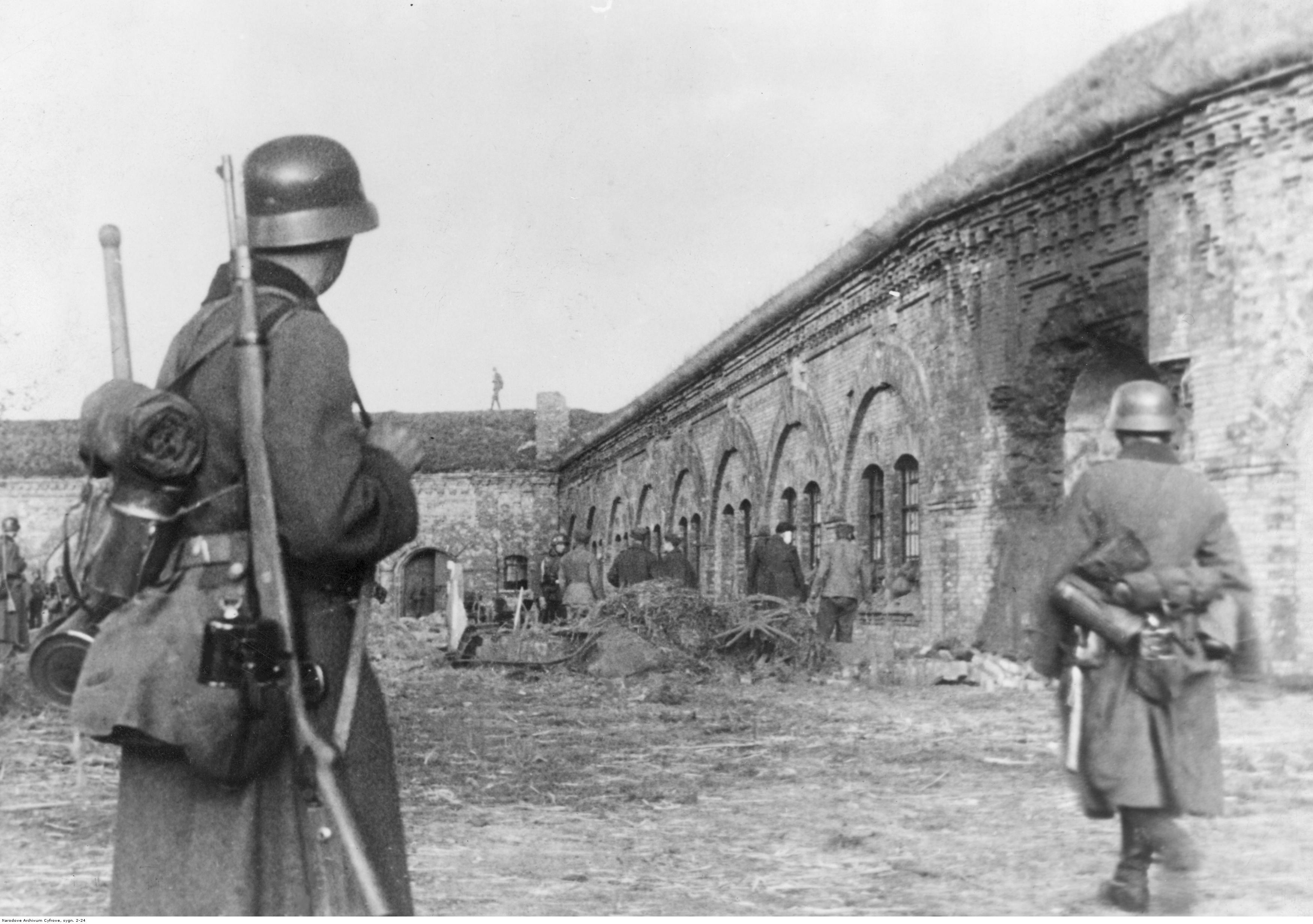 Zajęcie przez wojska niemieckie fortu na Sadybie. Żołnierze niemieccy na terenie fortu.